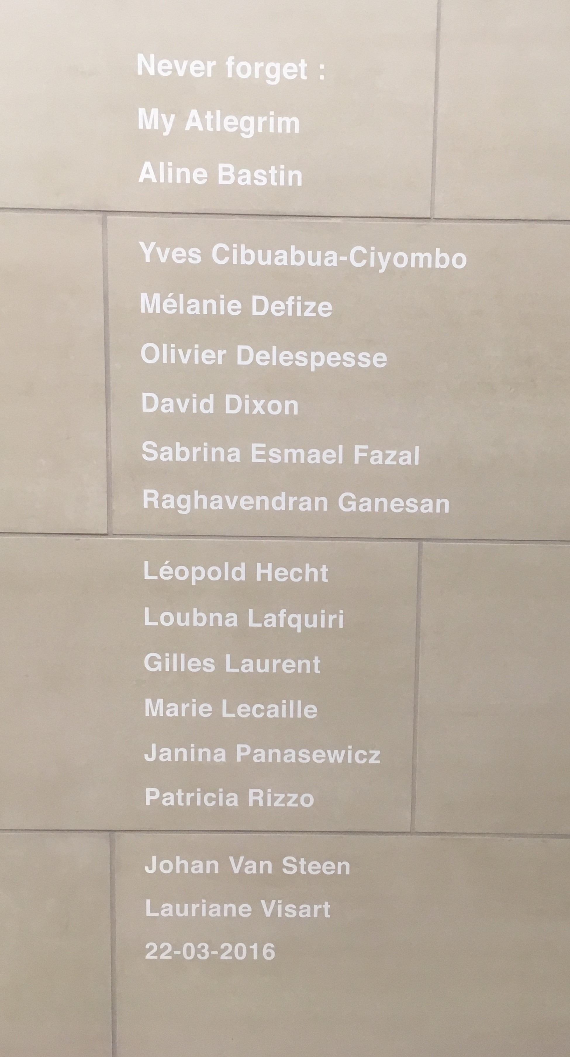 Gedenkliste zur Erinnerung an die 16 Todesopfer des Terroranschlags vom 22. März 2016 in der U-Bahn-Station Maelbeek in Brüssel